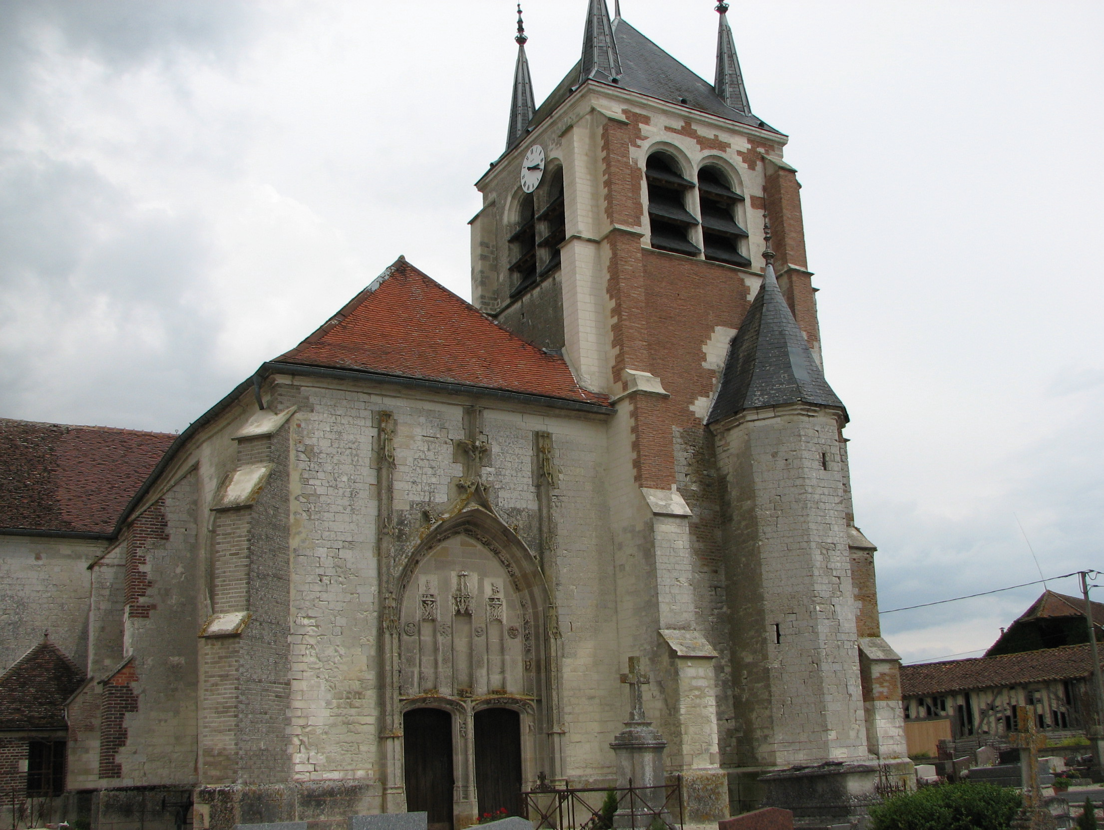 Eglise Notre-Dame de l'Assomption de Pel-et-Der dans l'Aube (France)